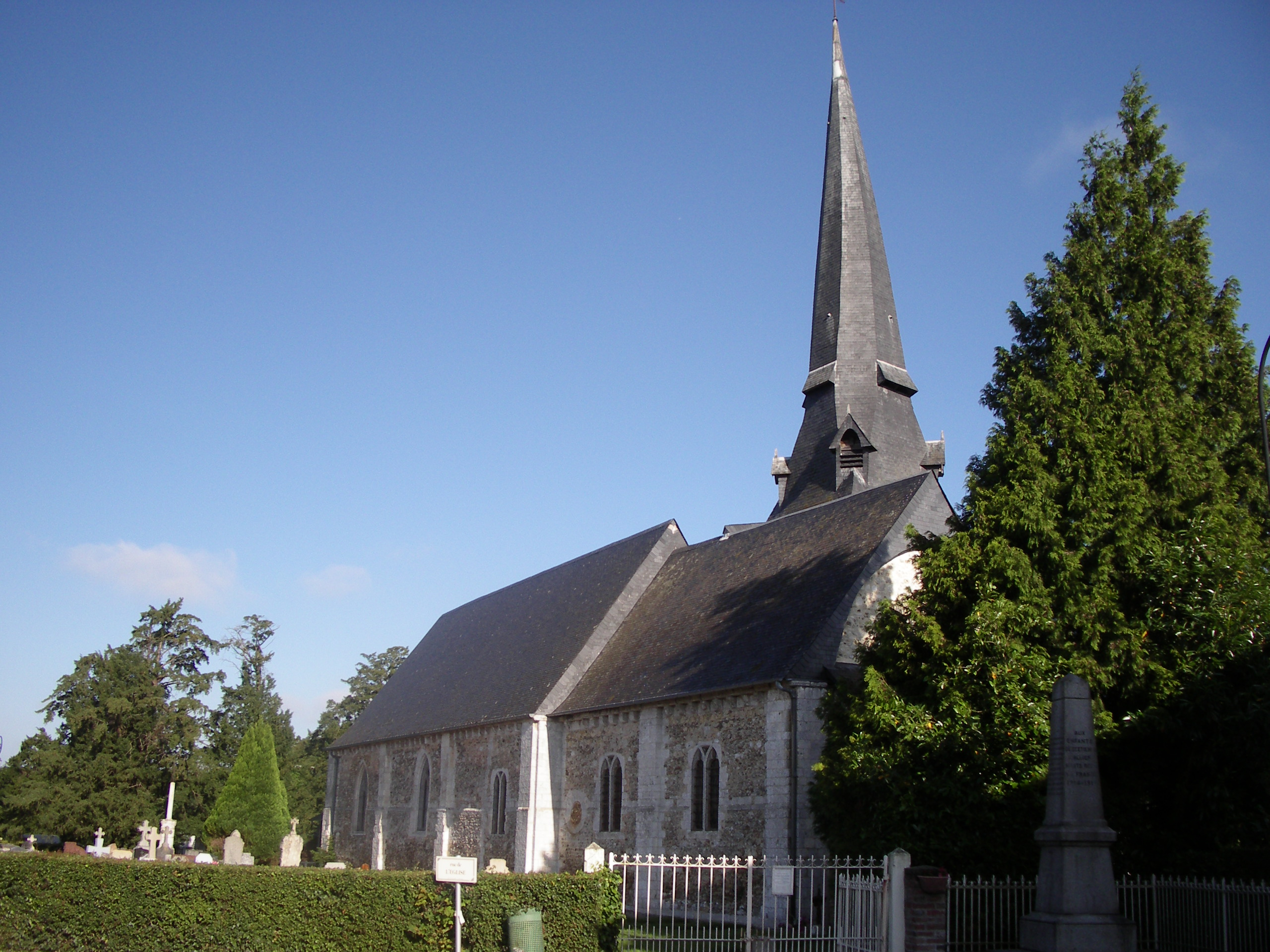 Eglise de Saint Etienne l'Allier - Eure